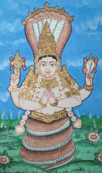 Pintura d'estilu Mysore con Patañjali como avatar de Ādi Śeṣa